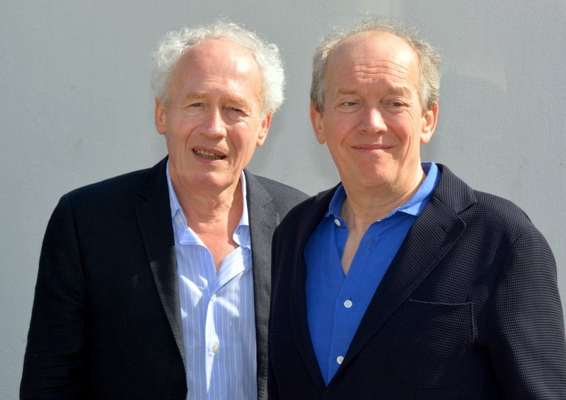 Les frères Dardenne au festival de Cannes